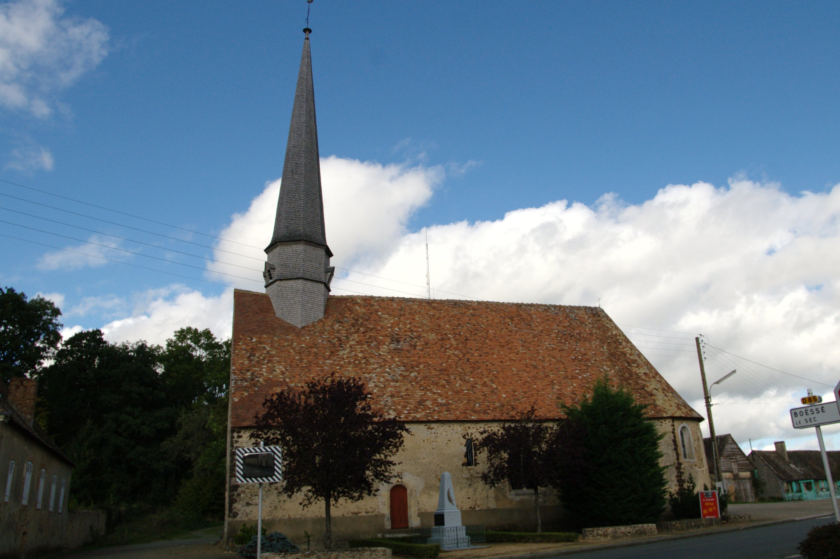 Église Saint-Jacques de La Bosse.